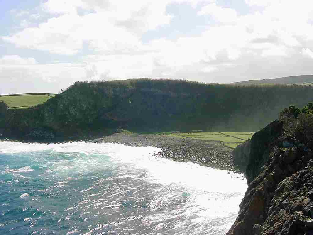 Baía da Reserva Natural da Alagoa da Fajãzinha, ilha Terceira, Açores, Portugal.